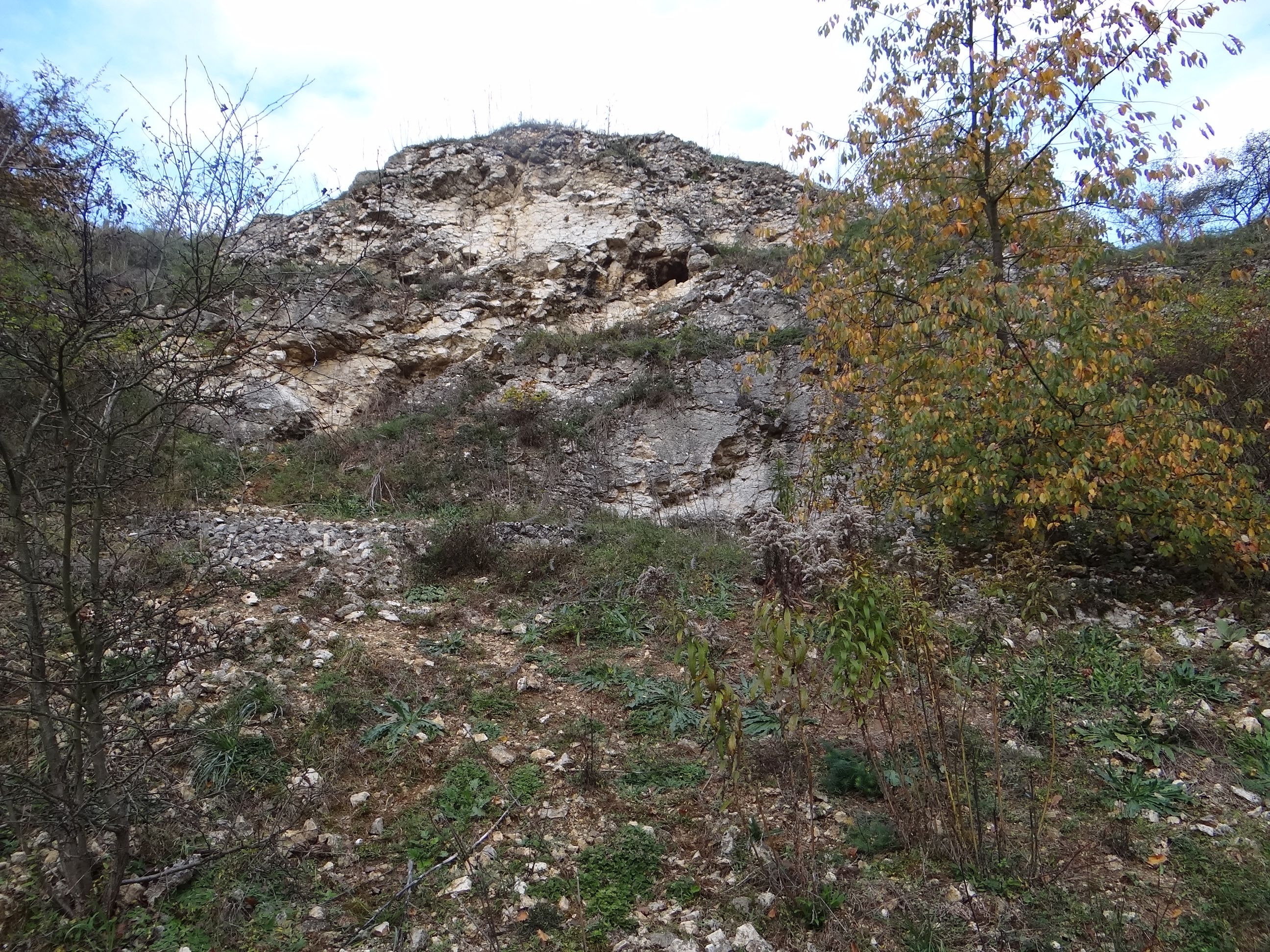 Łom Bergera na Księżej Górze w Pychowicach (Kraków)